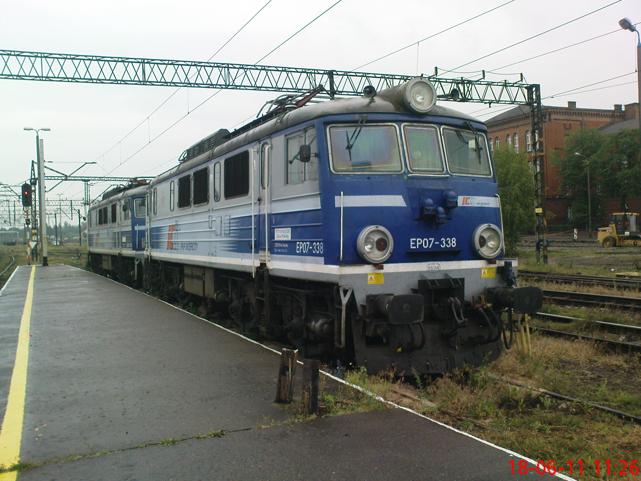 Lokomotywa EP07 - 338 jeszcze w malowaniu PKP INTERCITY na stacji Bydgoszcz Główna.